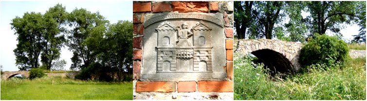 Klusbrücke bei Wahlitz (Sachsen-Anhalt)